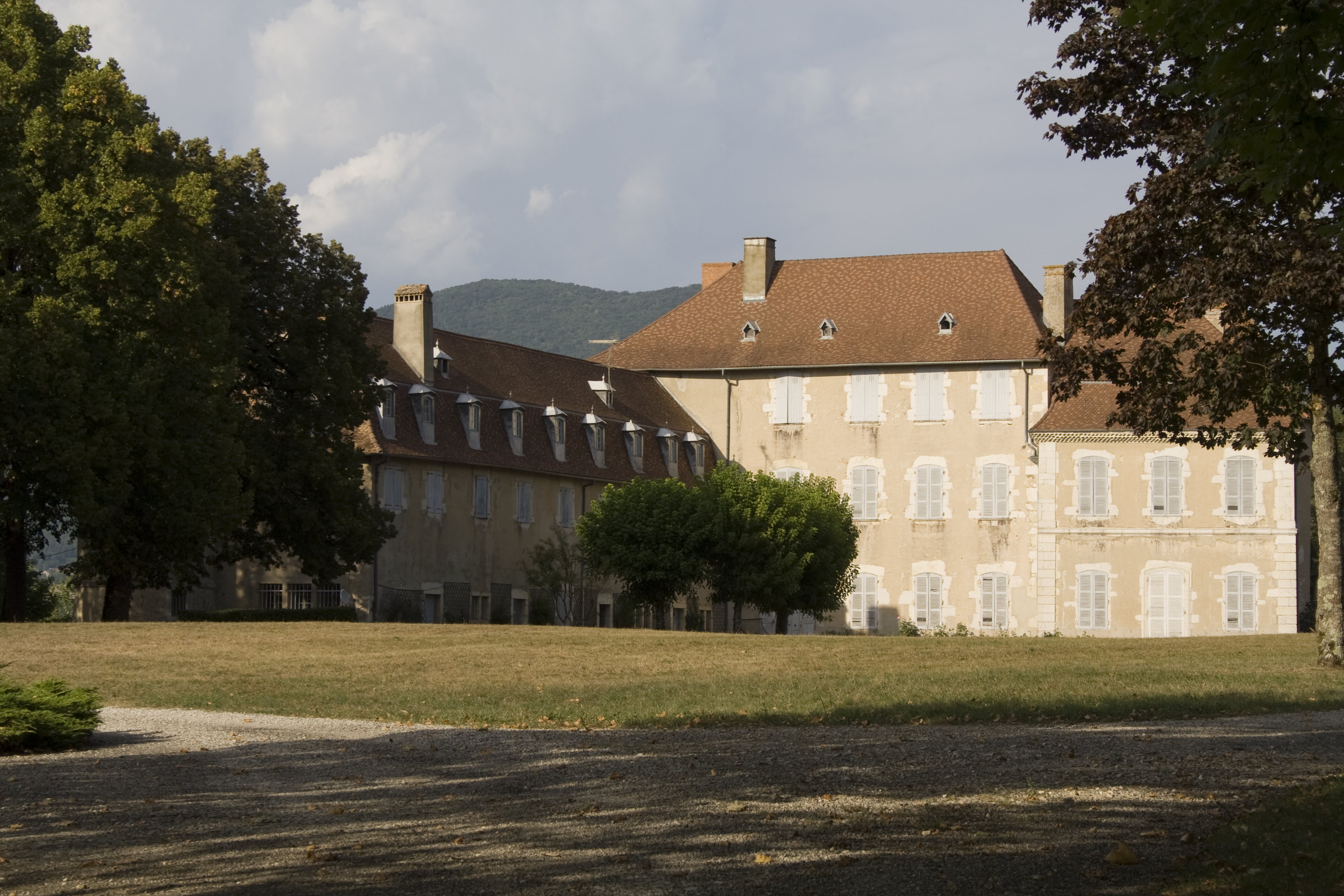 La propriété de Paul Claudel à Brangues près de Morestel (38510)